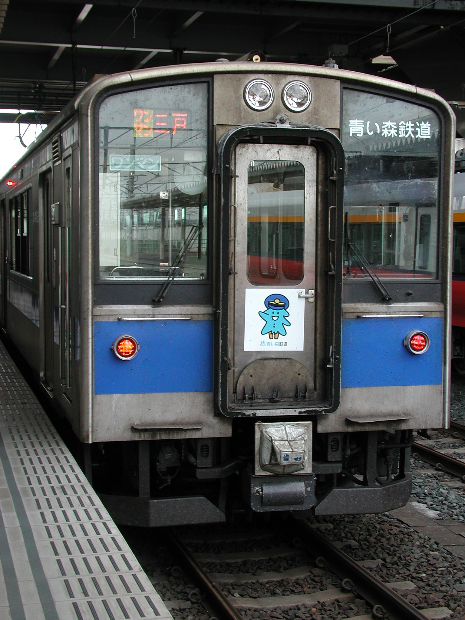 鉄道の日を記念し、青い森鉄道が一般公募によって選ばれたマスコットキャラクター『モーリー』のヘッドマークを掲げられた、青い森701系（自社発注車）